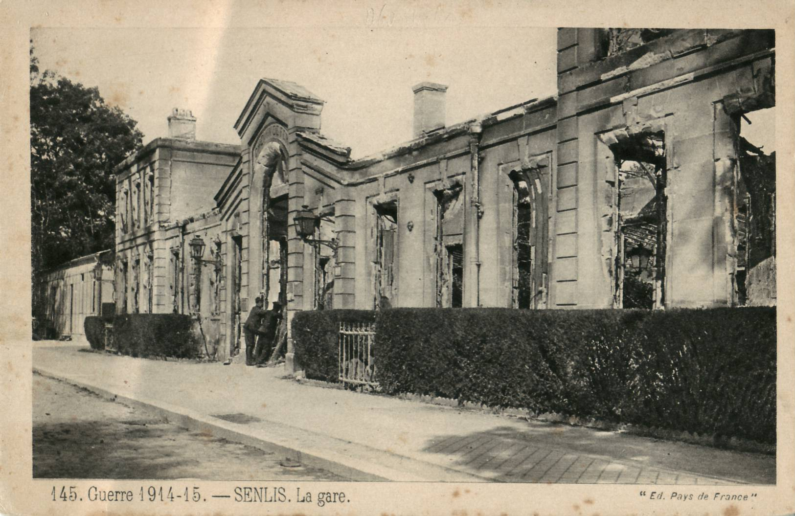 Carte postale ancienne éditée par Pays de France, collection Guerre de 1914-1915, n°145 : SENLIS - La Gare